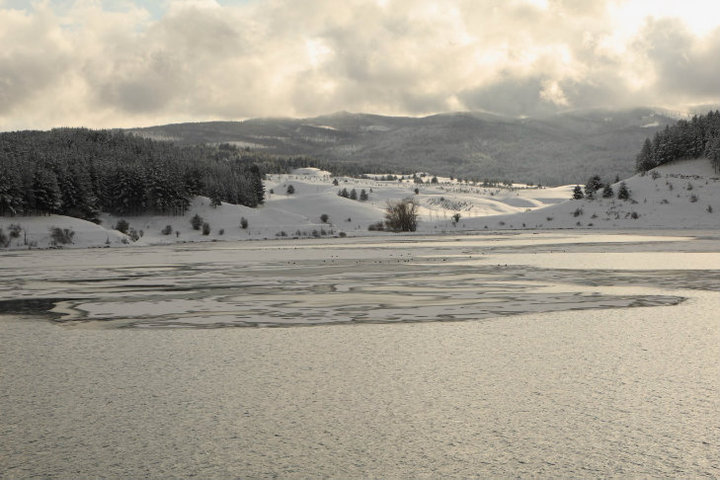 Sila, Lago Arvo ghiacciato - foto di G. Marasco